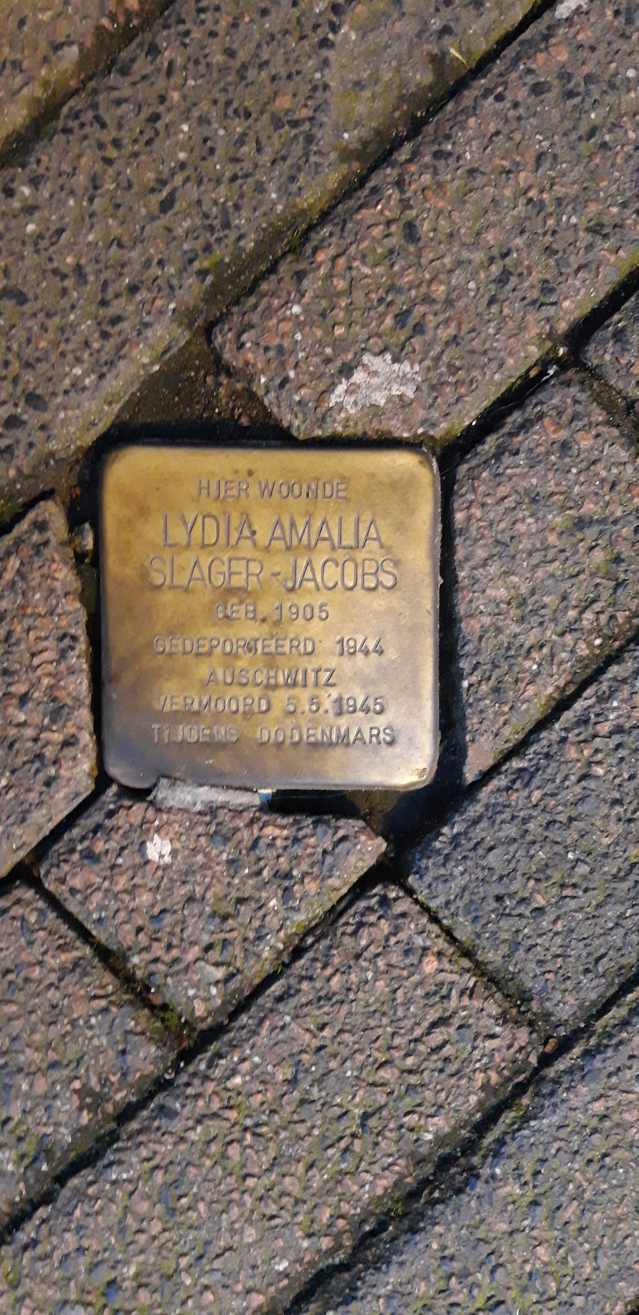 Stolpersteine Lydia Amalia Slager-Jacobs, vermoord 5 mei 1945 tijdens dodenmars